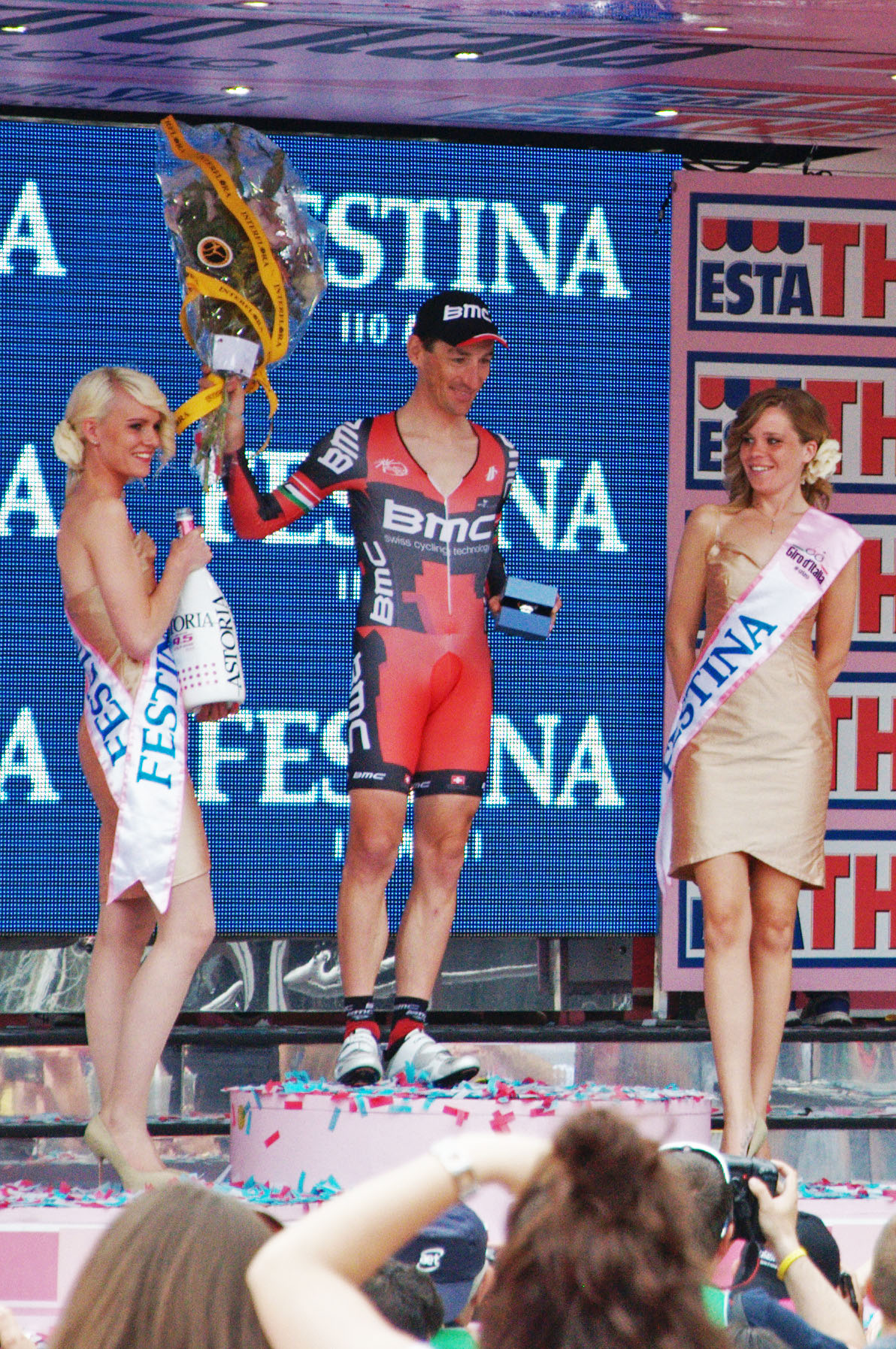 Marco Pinotti sul palco di Milano del Giro d'Italia 2012